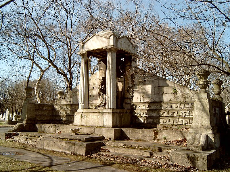 Kasselik Ferenc (Pest, 1795 – Budapest, 1884. december 9.) építész síremléke Budapesten. (Apja, Kasselik Fidél építőmester.) Neoeklektikus stílus. Kerepesi temető: 20/1-1-1 [szobrász: Chapu, Henri Michel, építész: Giergl Kálmán] This is a photo of a monument in Hungary. Identifier: 937